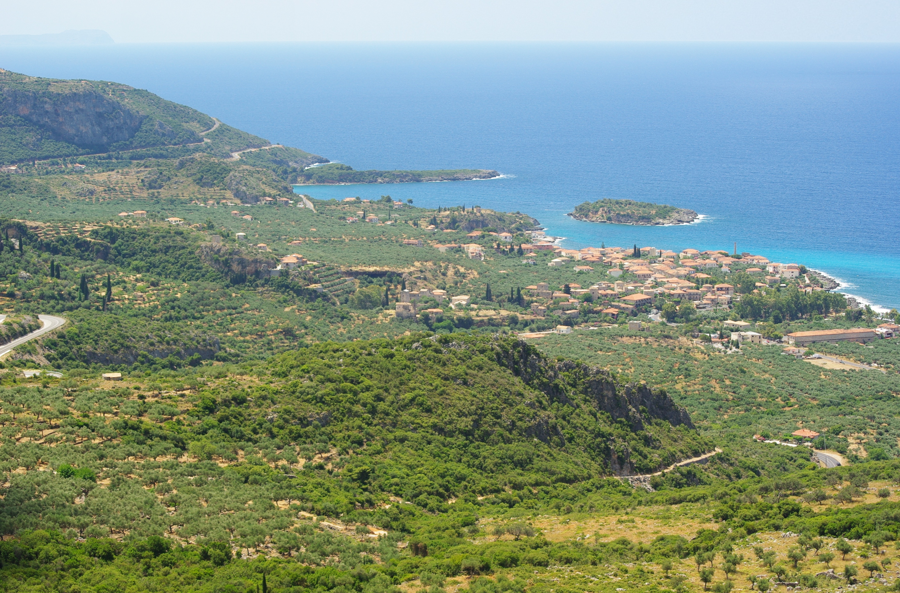 Blick auf Kardamyli, aufgenommen von der Straße von Norden kommend